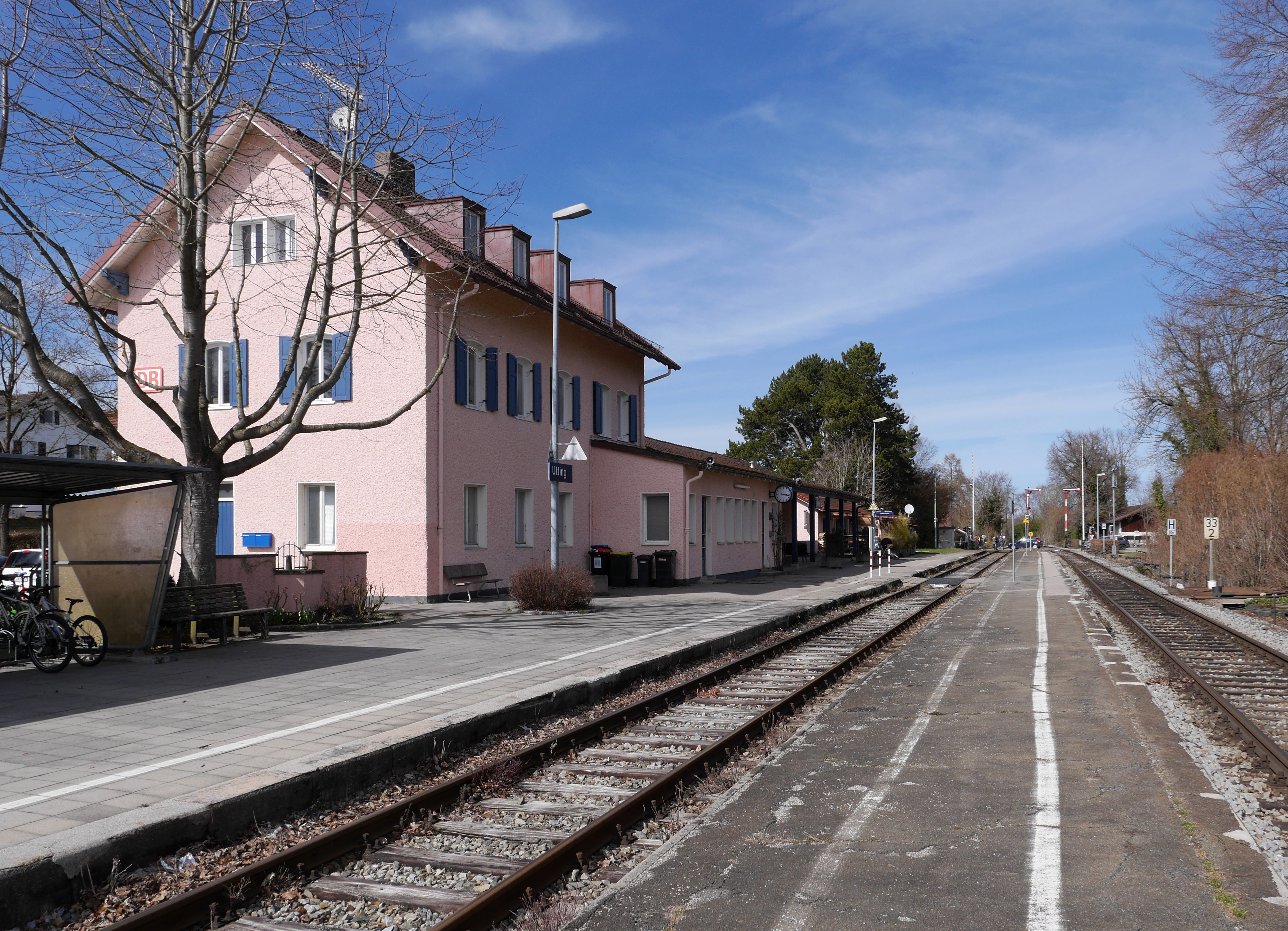 Empfangsgebäude und Bahnsteige des Bahnhofs Utting, in Richtung Norden gesehen